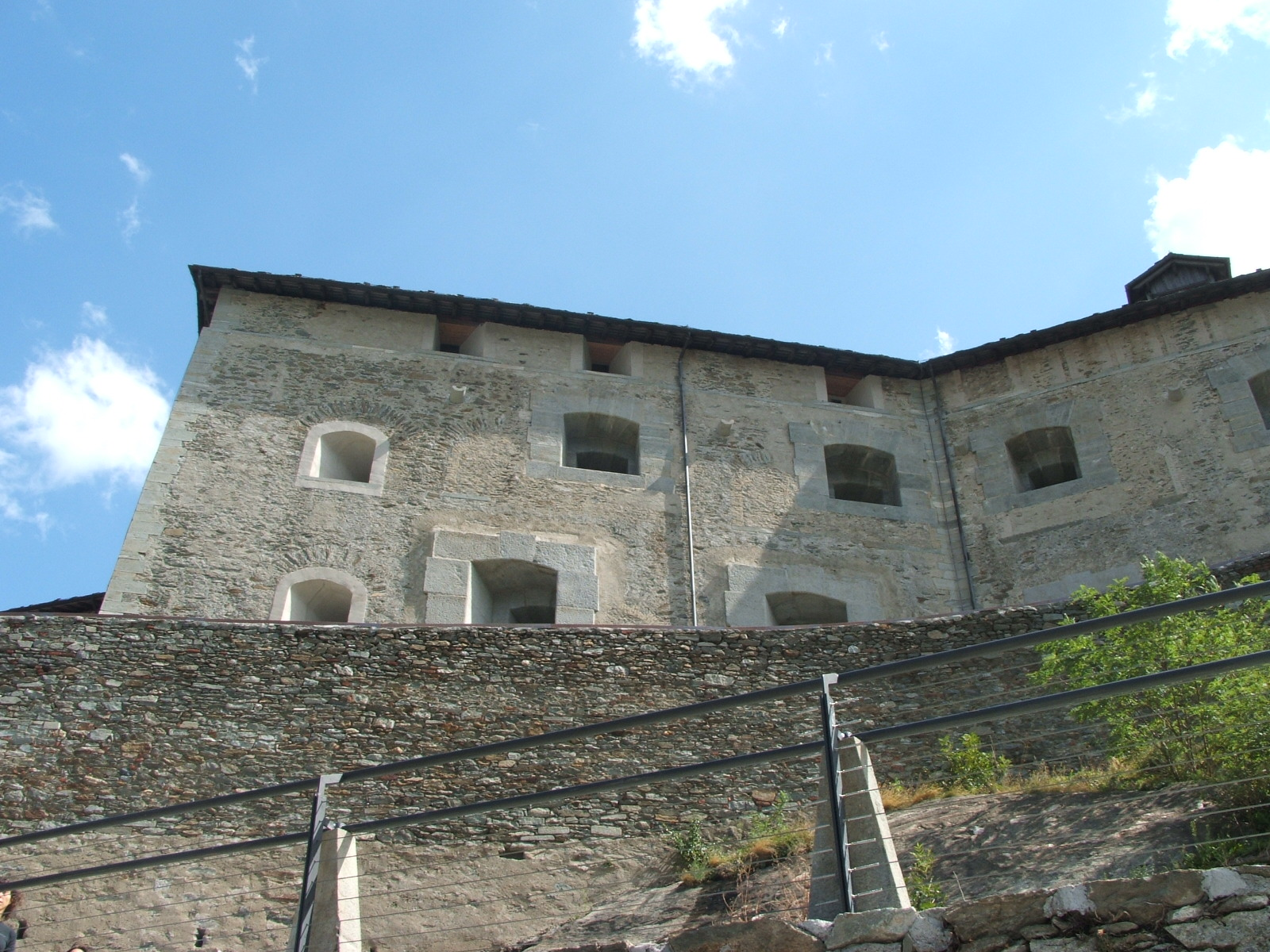 Vall'Aosta - Forte di Bard e Museo delle Alpi